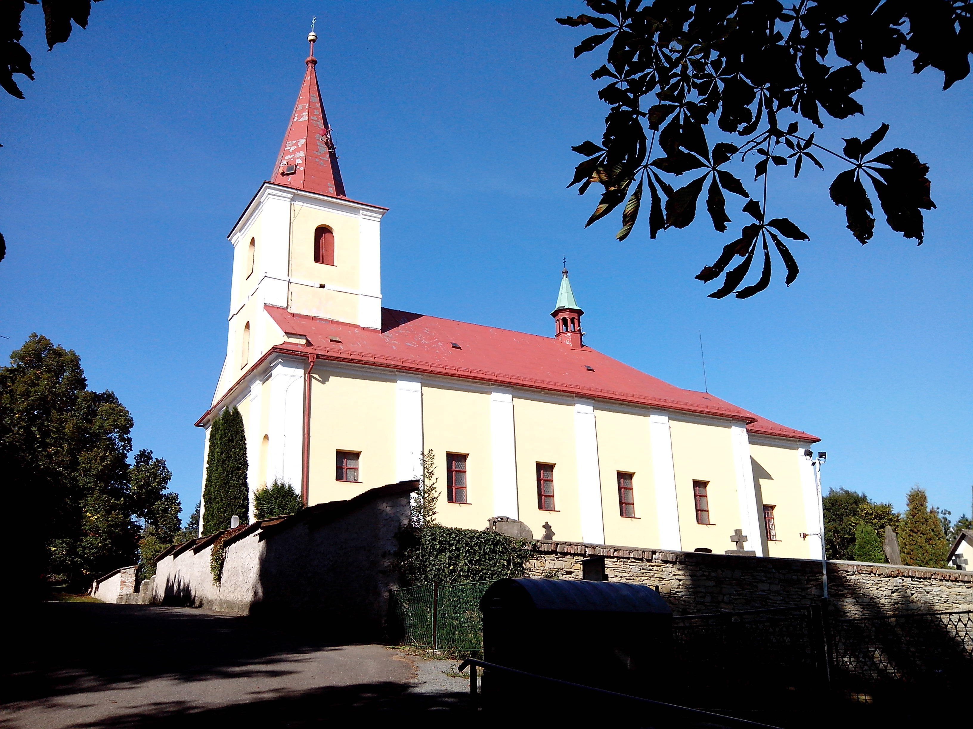 Skuhrov nad Bělou - kostel sv. Jakuba Většího